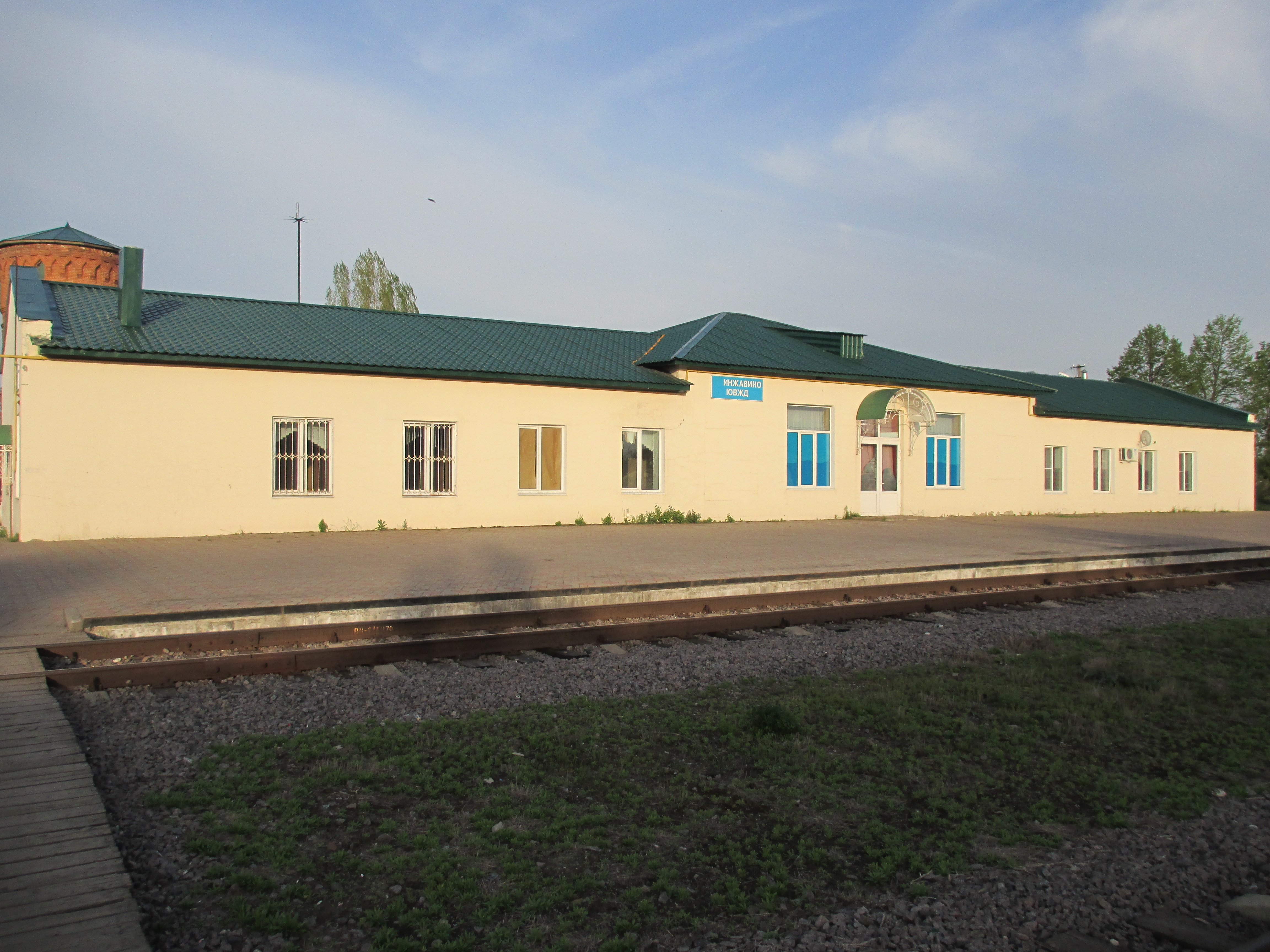 Пассажирское здание станции Инжавино